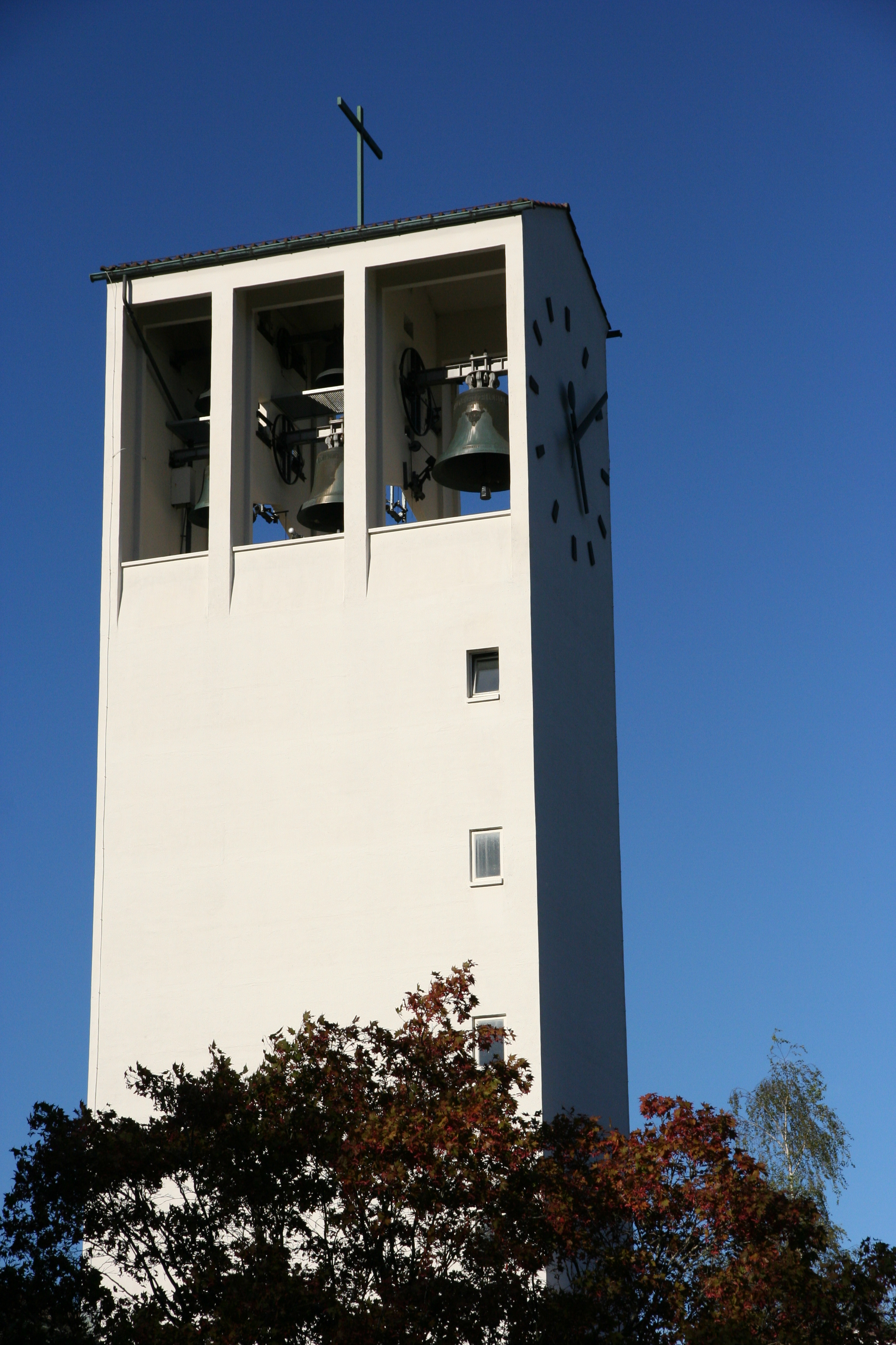 Römisch-katholische Pfarrkirche St. Gallus Oberuzwil